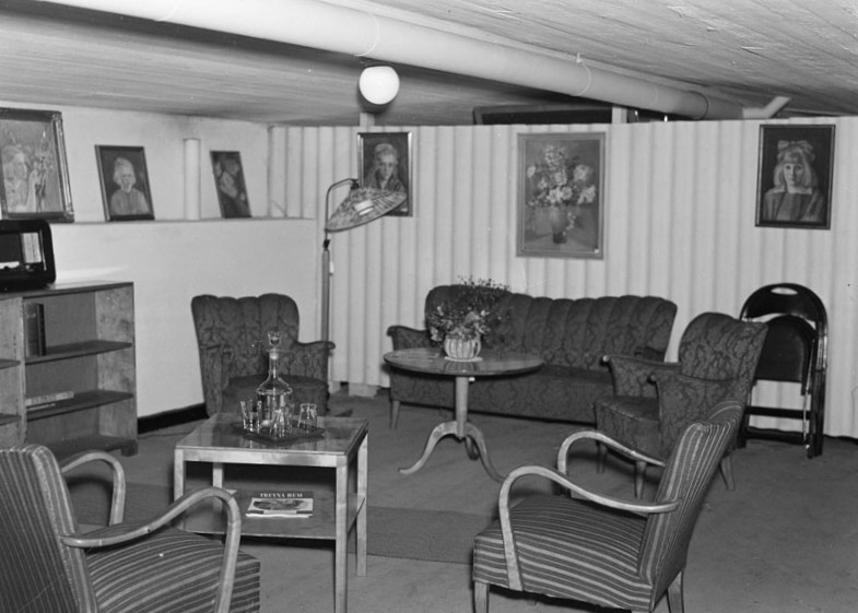 Torsgatan. Skyddsrum, tillfälligt inrett i hemmiljö. Rummet ska kunna vara bostad åt mer än 300 personer per dygn.